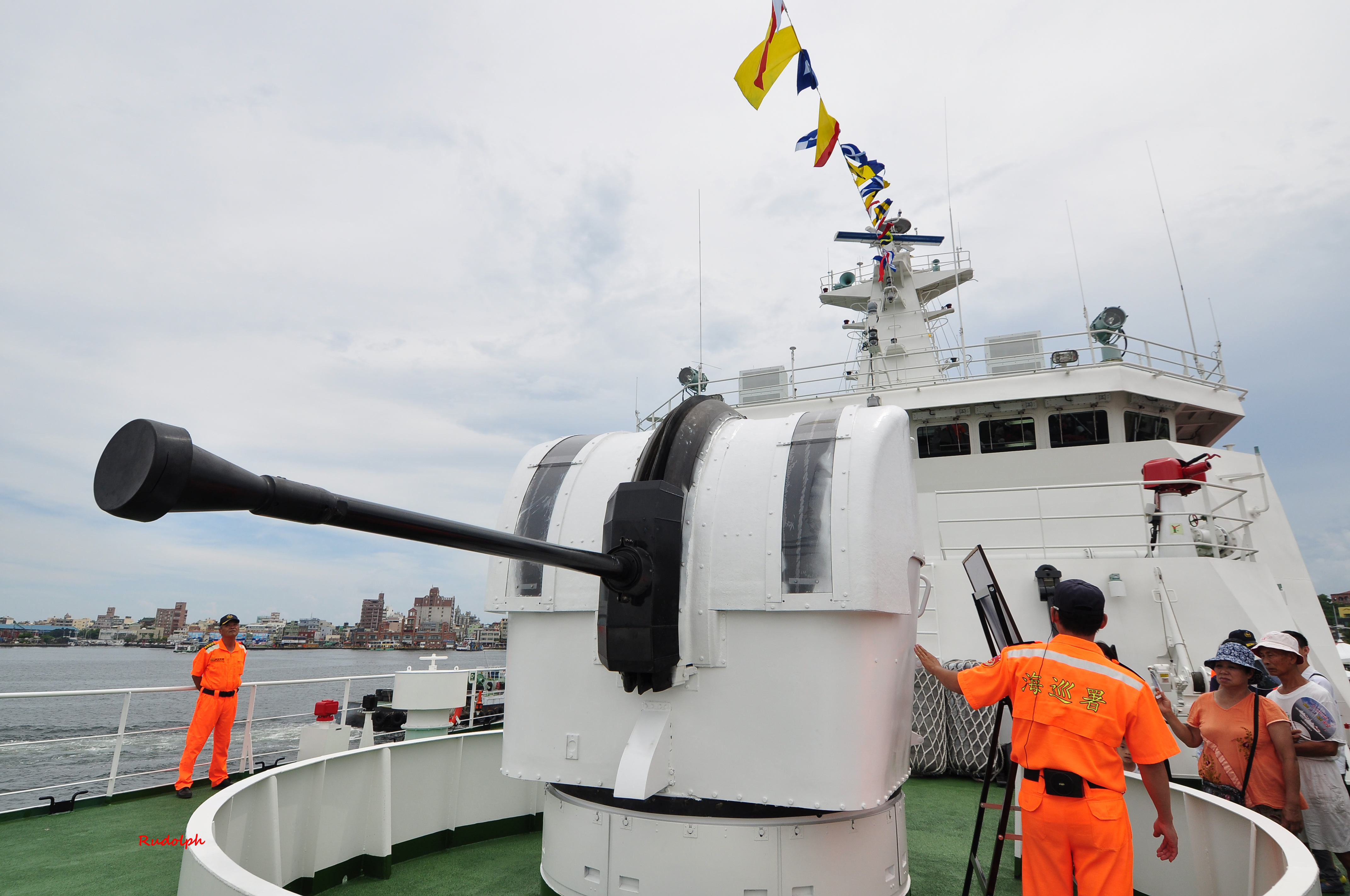 高雄艦艦艏Bofors 40mm快砲